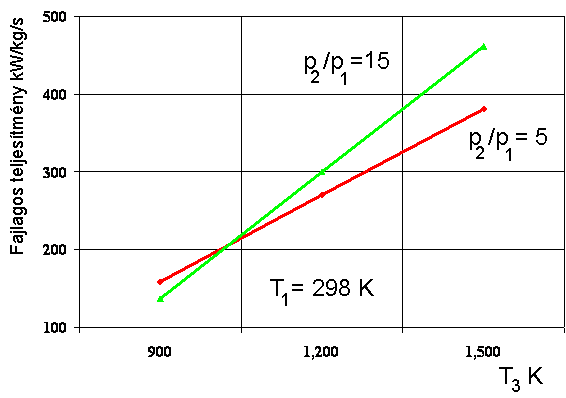 Gázturbina (Brayton-ciklus) fajlagos teljesítménye a gázturbinába belépő gáz hőmérsékletének függvényében